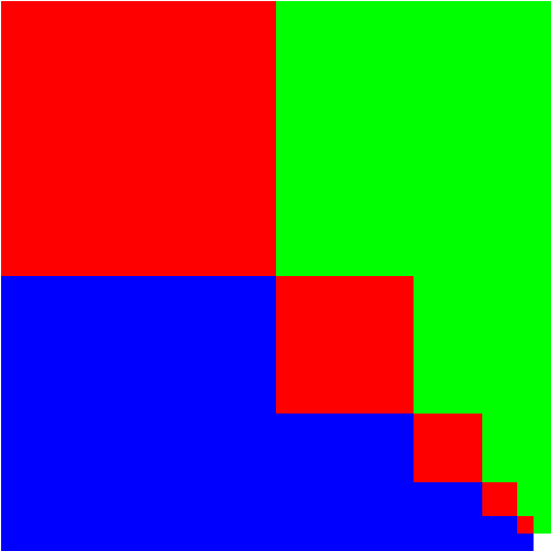 Efficient storage of a RGB bitmap containing LODs